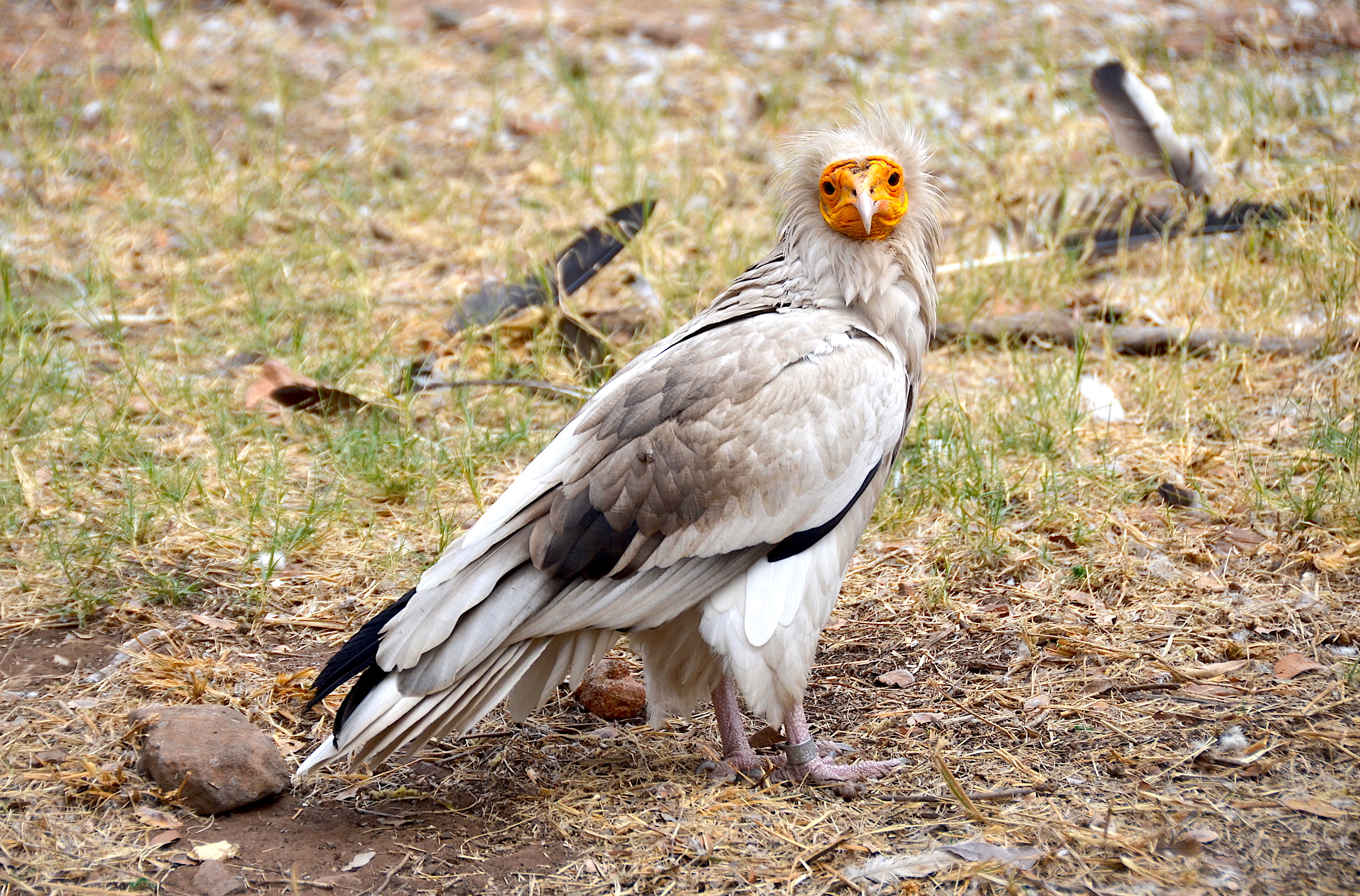 Schmutzgeier im De Wildt Cheetah and Wildlife Centre (South Africa)